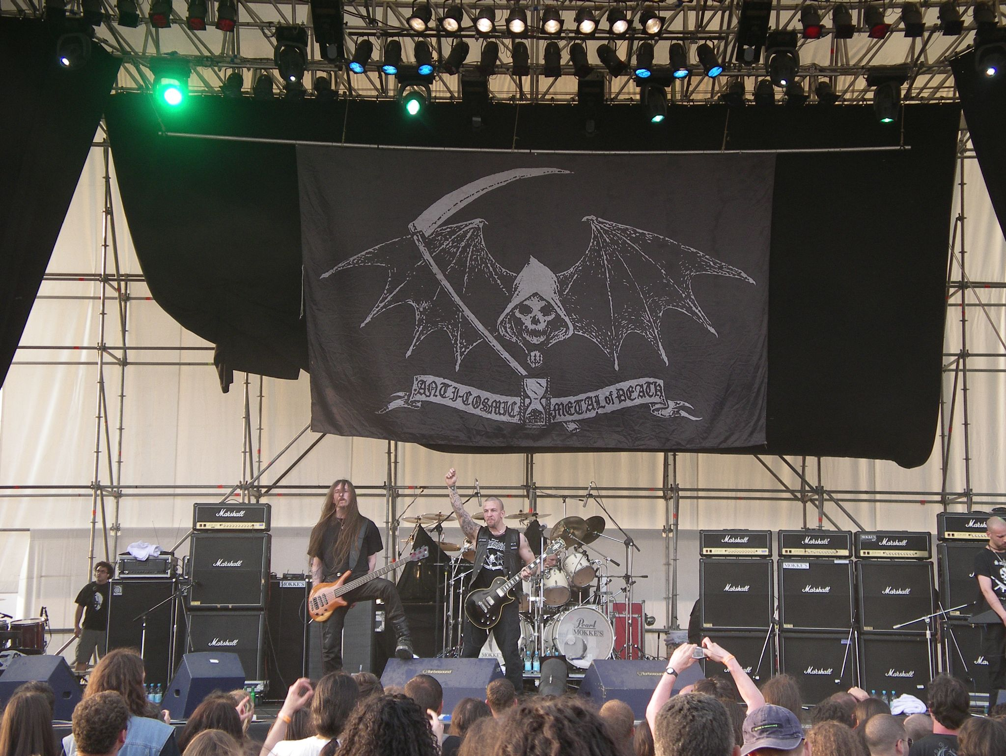 Dissection actuando en el Tradate Iron Fest de 2005.